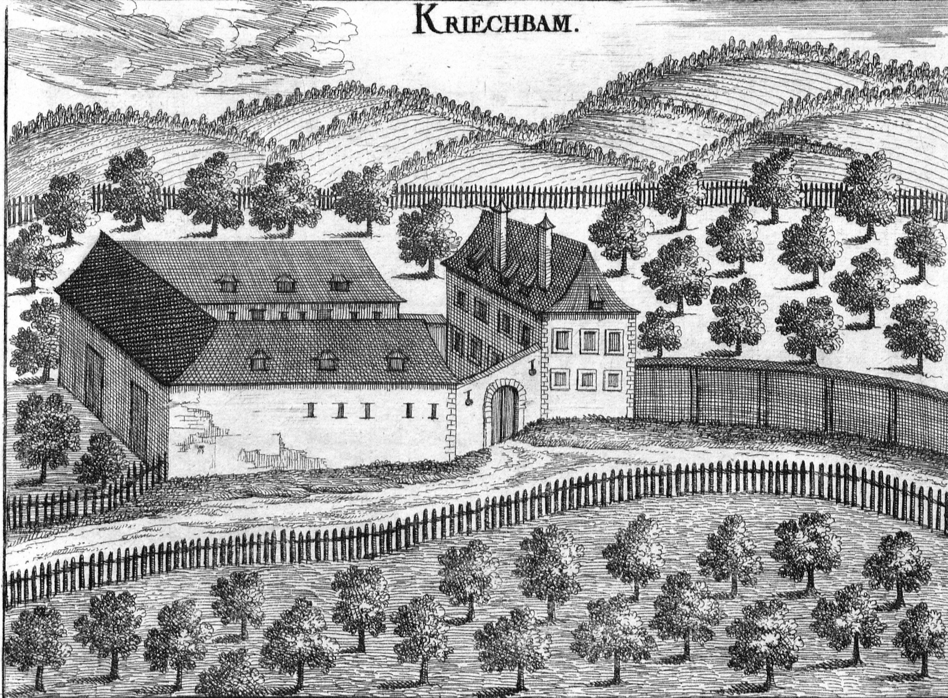 Kupferstich des Sitzes in Kriechbaum in der Gemeinde Allerheiligen im Mühlkreis